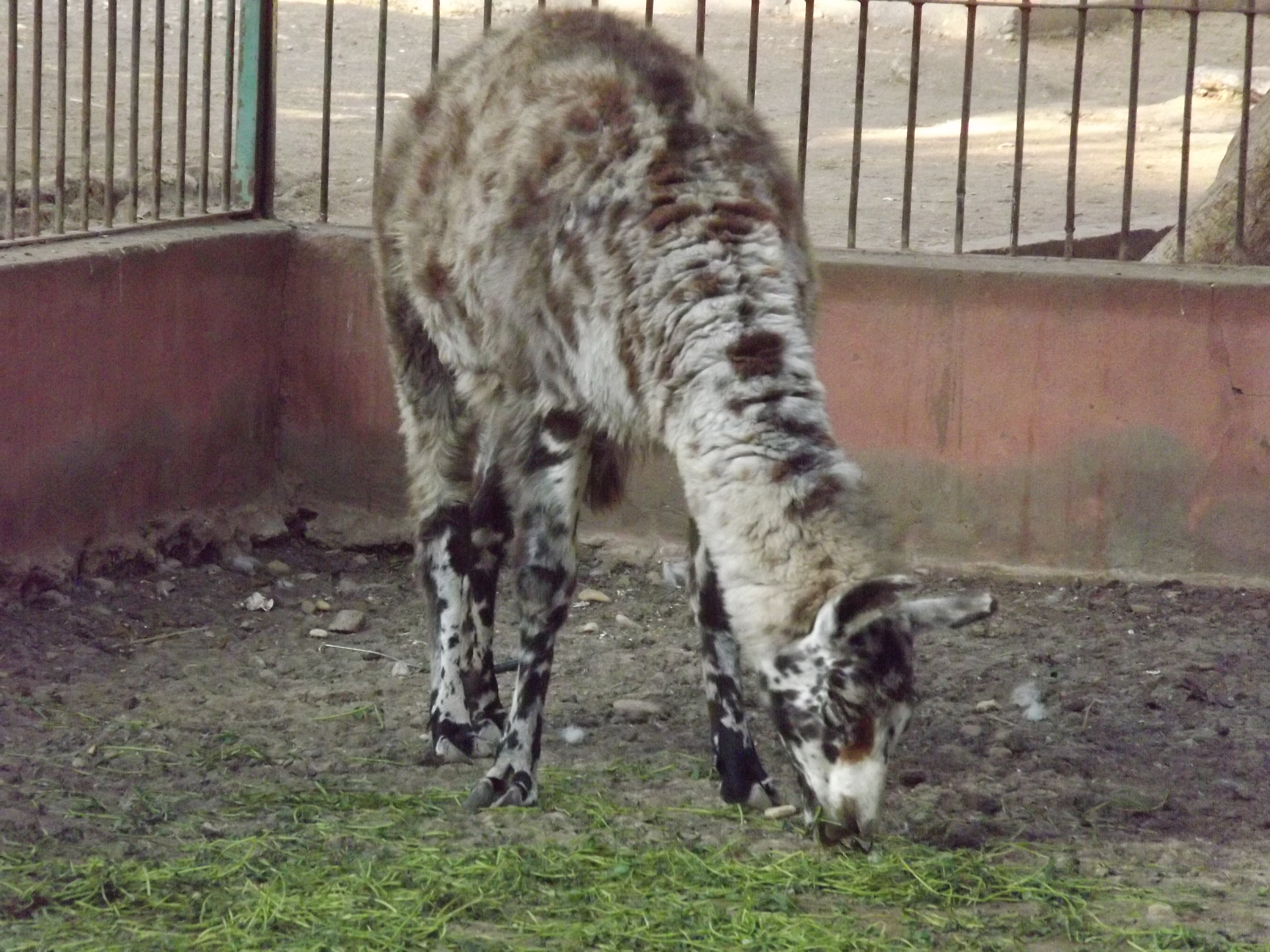 لاما أهلية